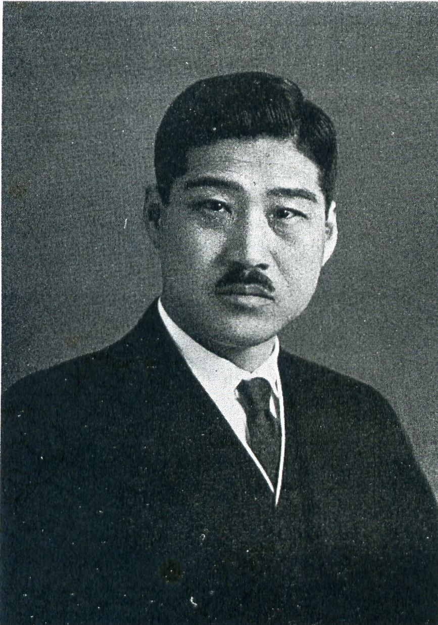 この写真は、東条貞（1885-1950）の写真です。